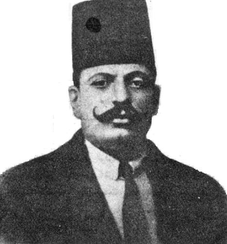 عبد اللطيف خليل بك الأسعد (1886- 1936) - والد أحمد بك الأسعد وجد كامل أحمد بك الأسعد - سياسي لبناني من جبل عامل (جنوب لبنان)